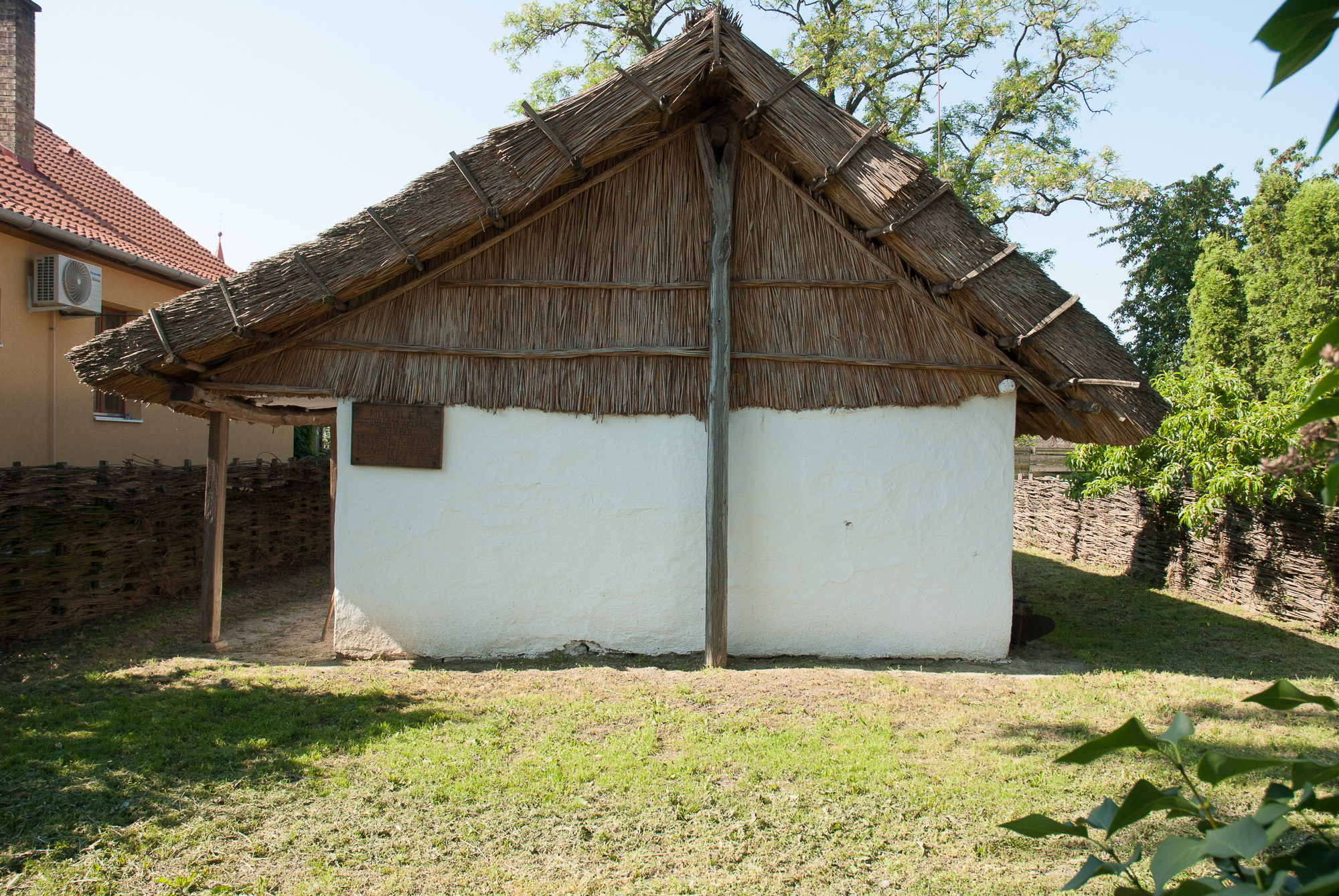 Tiszacsege Zsellérház, múzeumként látogatható